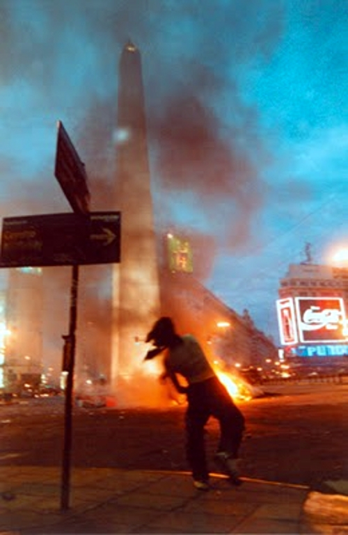 Argentinazo. 20/12/2001